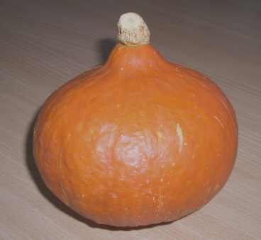 Hokkaidokürbis